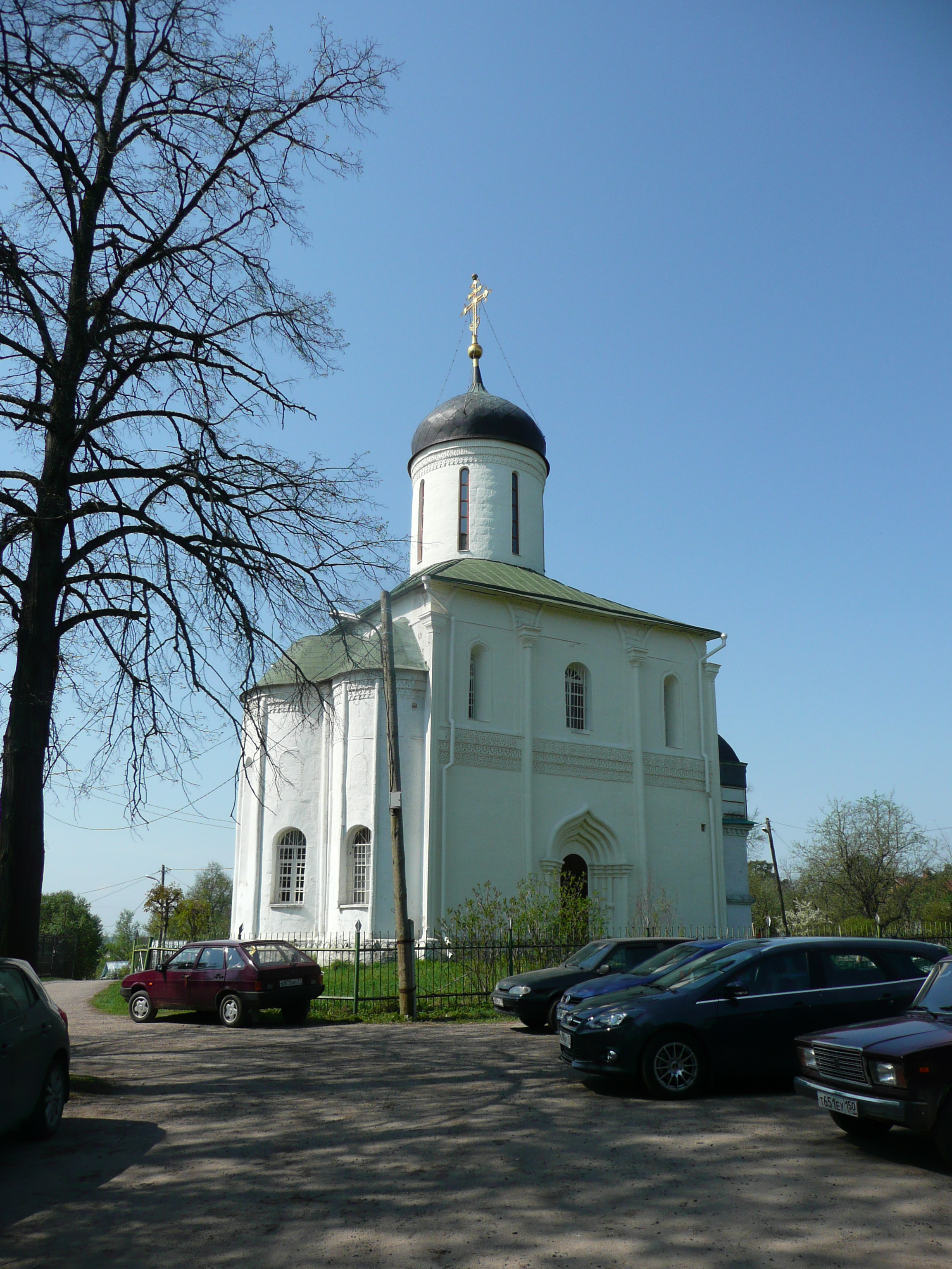 Собор Успенский (Москва и Московская область, Звенигород, город Звенигород)